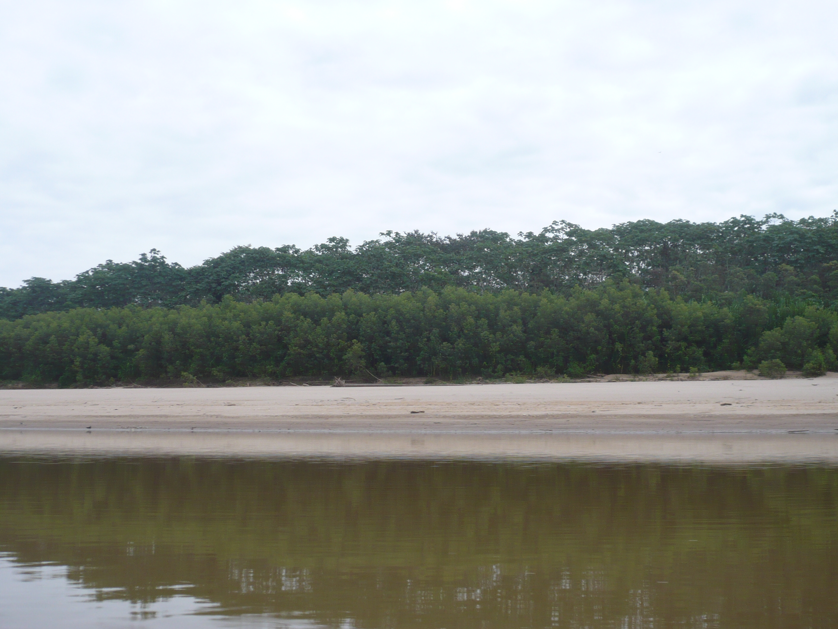 Río Manu en el Parque Nacional del Manu.